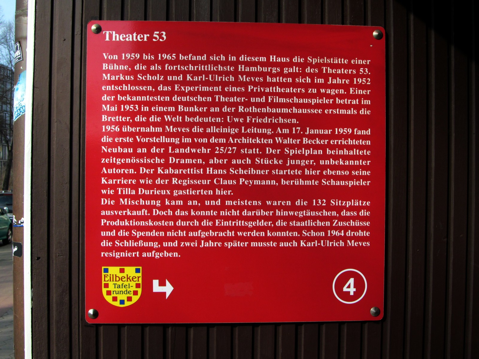 Eilbeker Tafelrunde 4: Gedenktafel für das "Theater 53" in der Landwehr in Hamburg-Eilbek